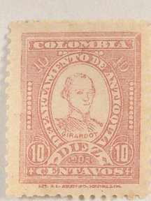 Antioquia stamp